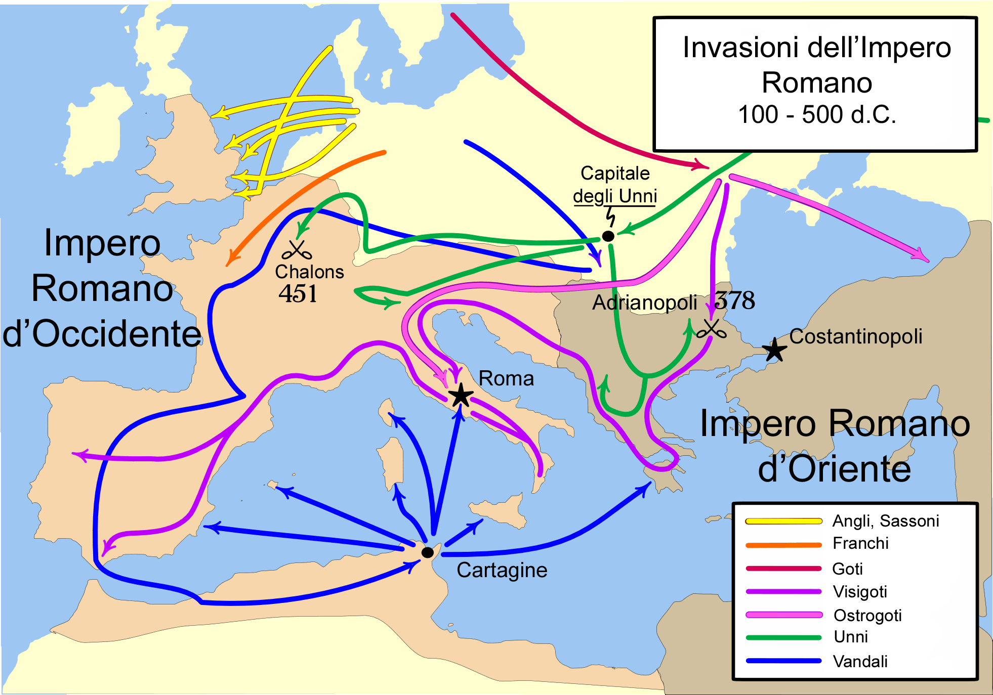 Mappa delle invasioni dal 100 al 500 d.C.